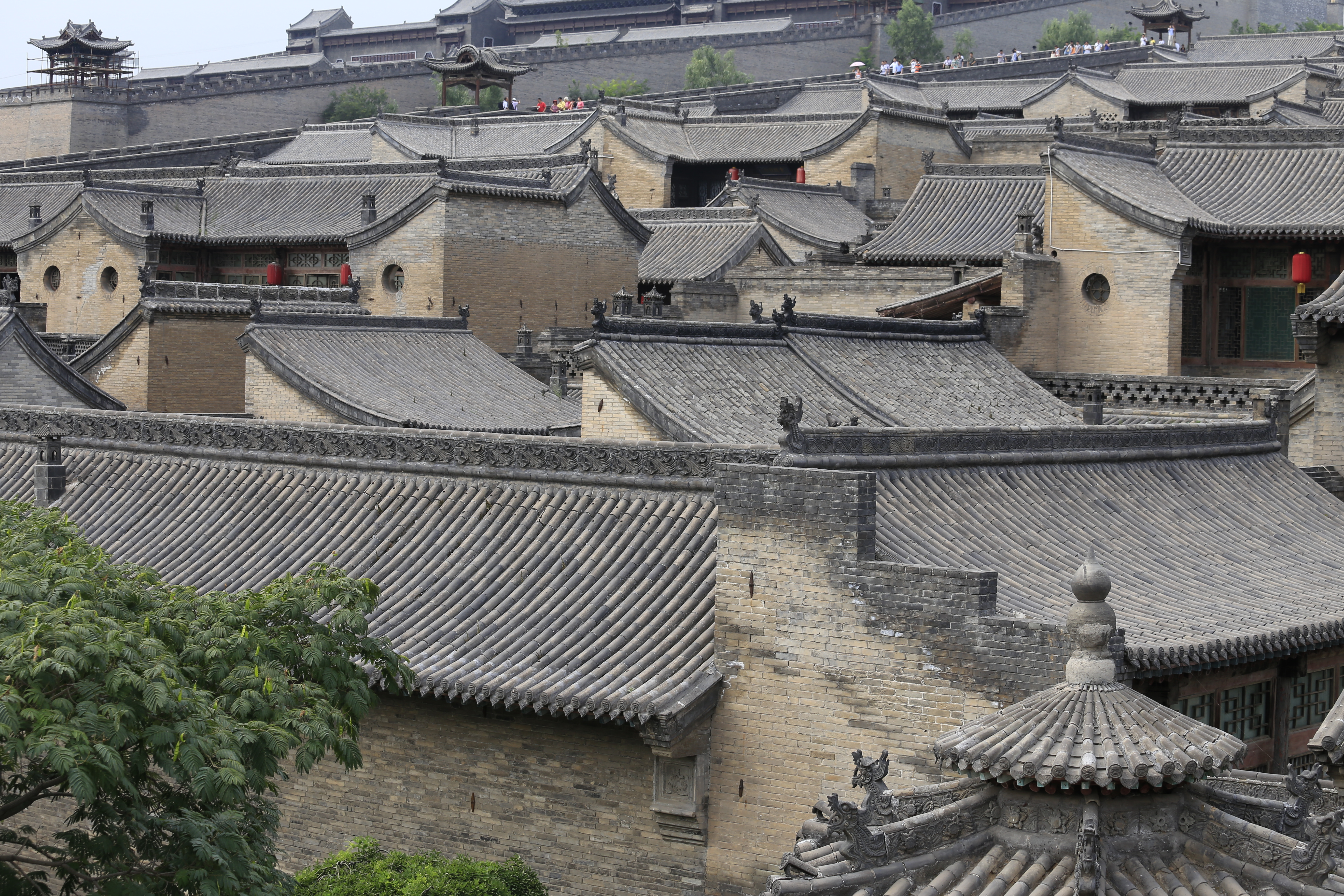 灵石静升王家大院 —— 西院（红门堡）